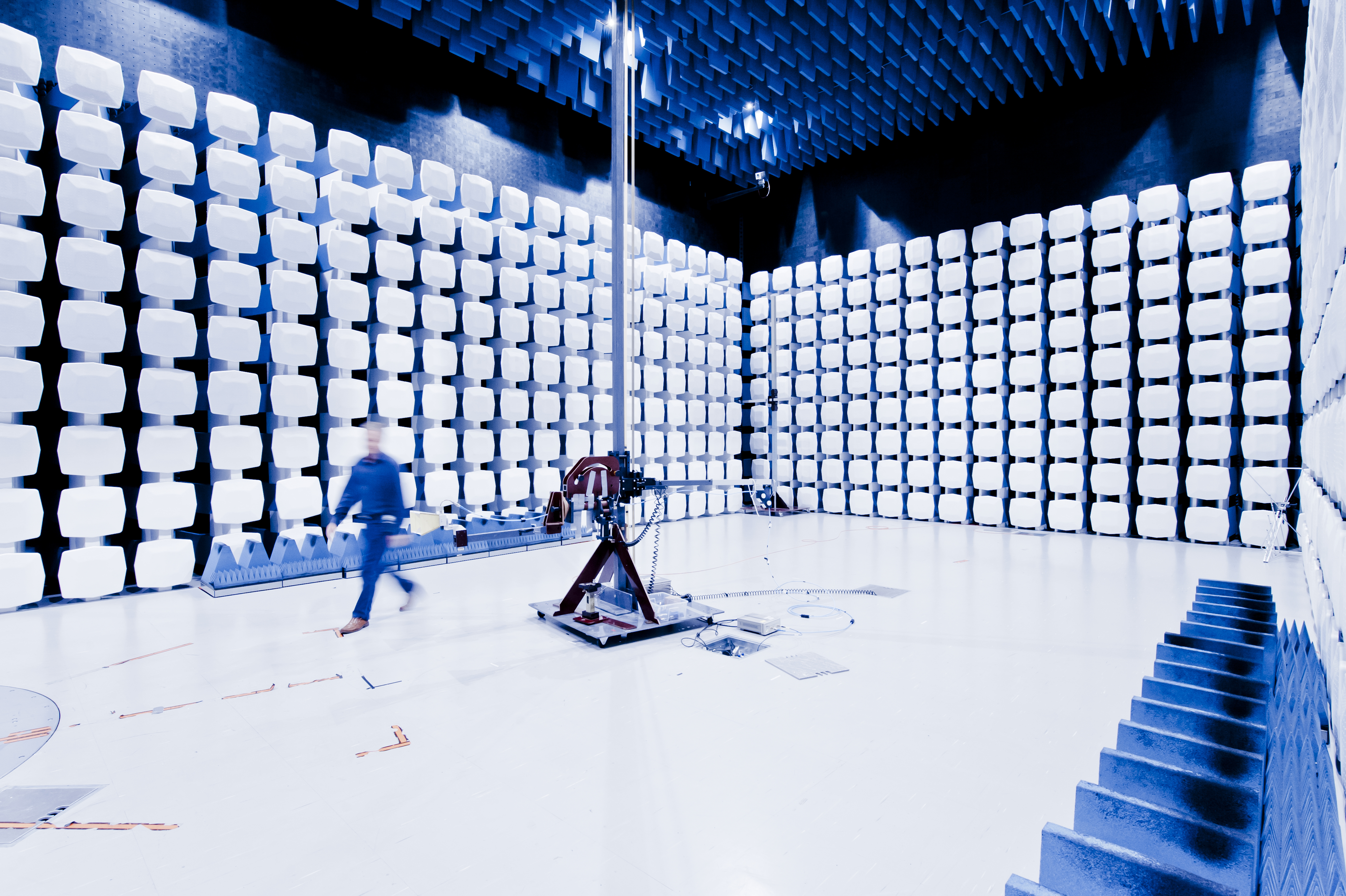 Anechoic chamber for EMC testing (Electromagnetic Compatibility) Nemko Norway